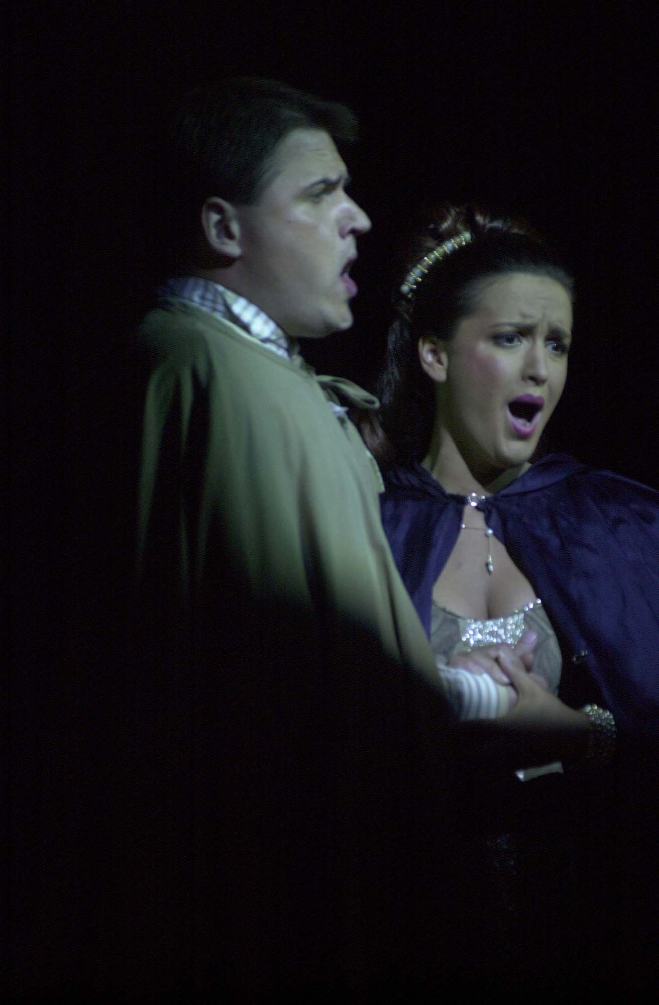 Blagoj Nacoski